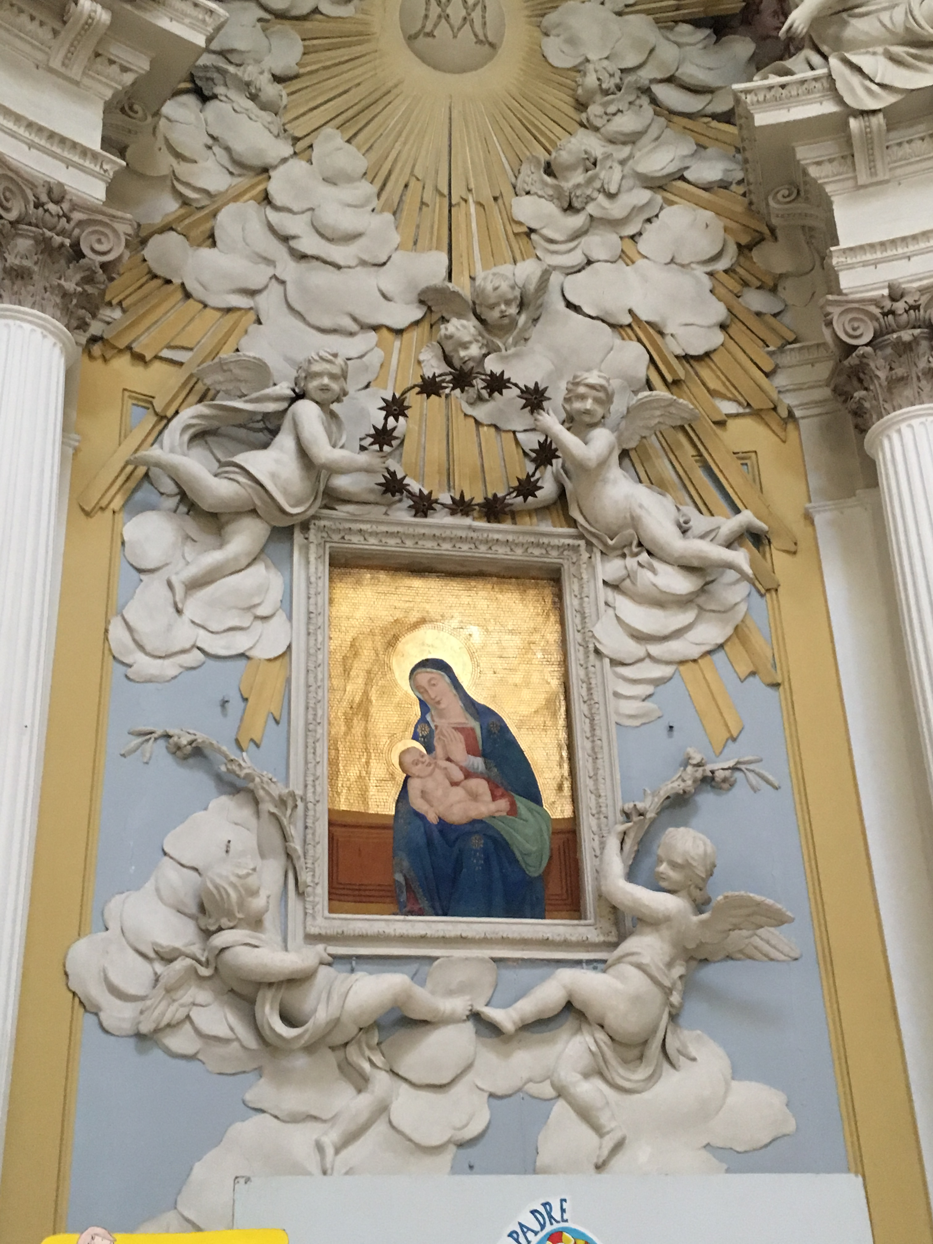 Santuario Madonna della Bianca. Immagine del XVI secolo